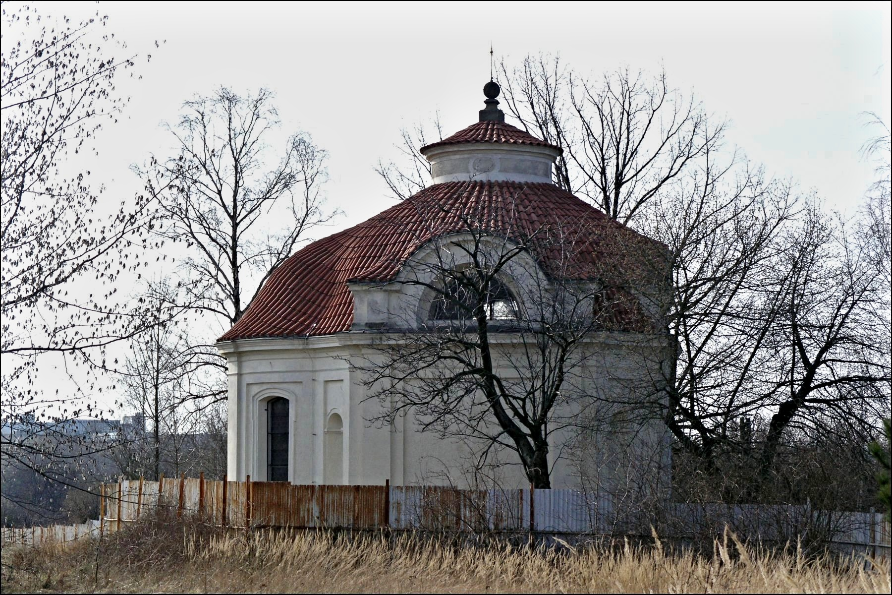 Kaple Nalezení svatého Kříže (Praha, Stodůlky)